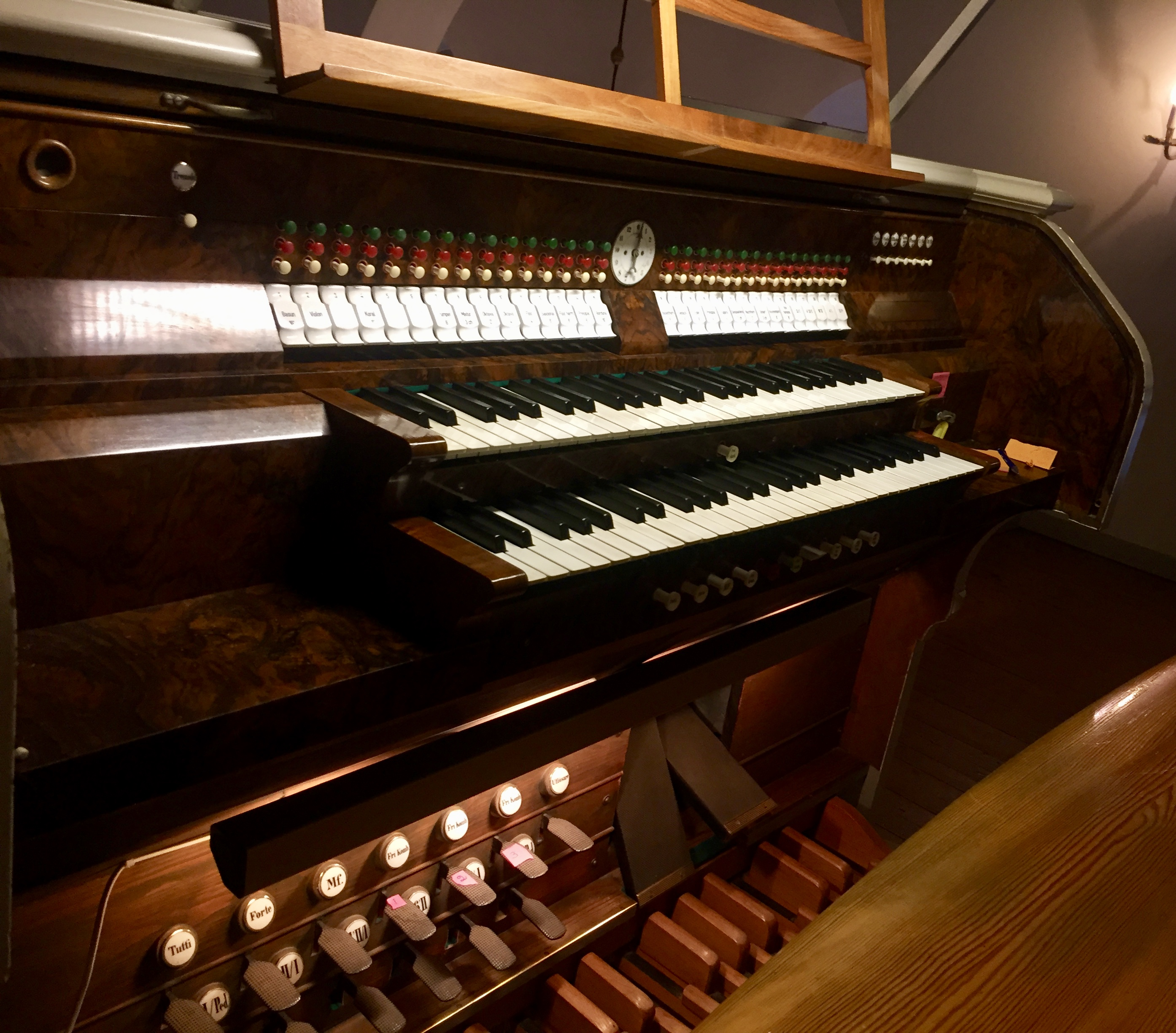 Läktarorgelns spelbord i Kastlösa kyrka på Öland (Åkerman & Lund 1937).